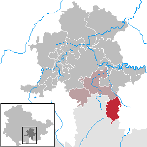 Lehesten in Thuringia - District Saalfeld-Rudolstadt